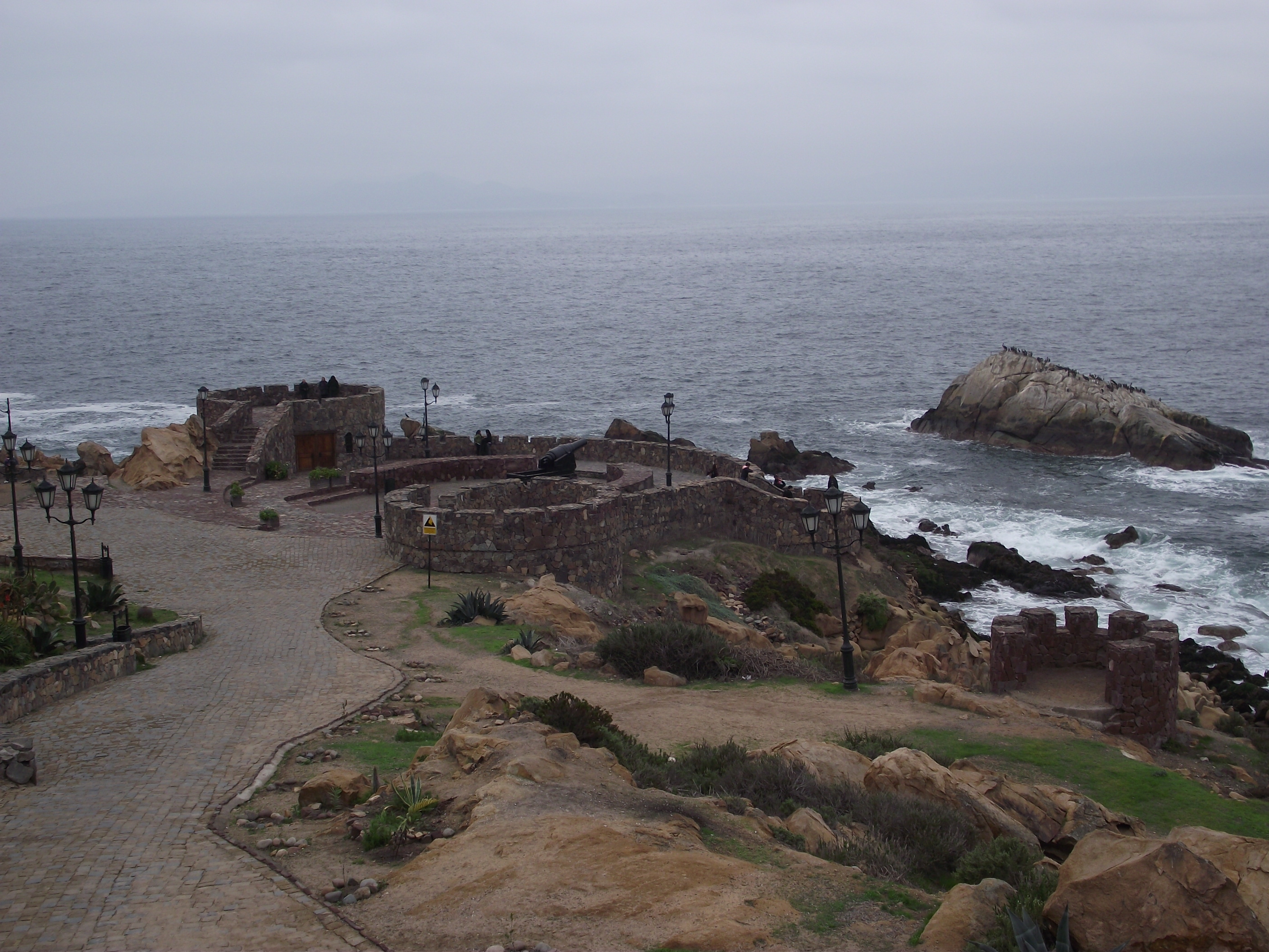 Fuerte Lambert, ubicado en la ciudad de Coquimbo.